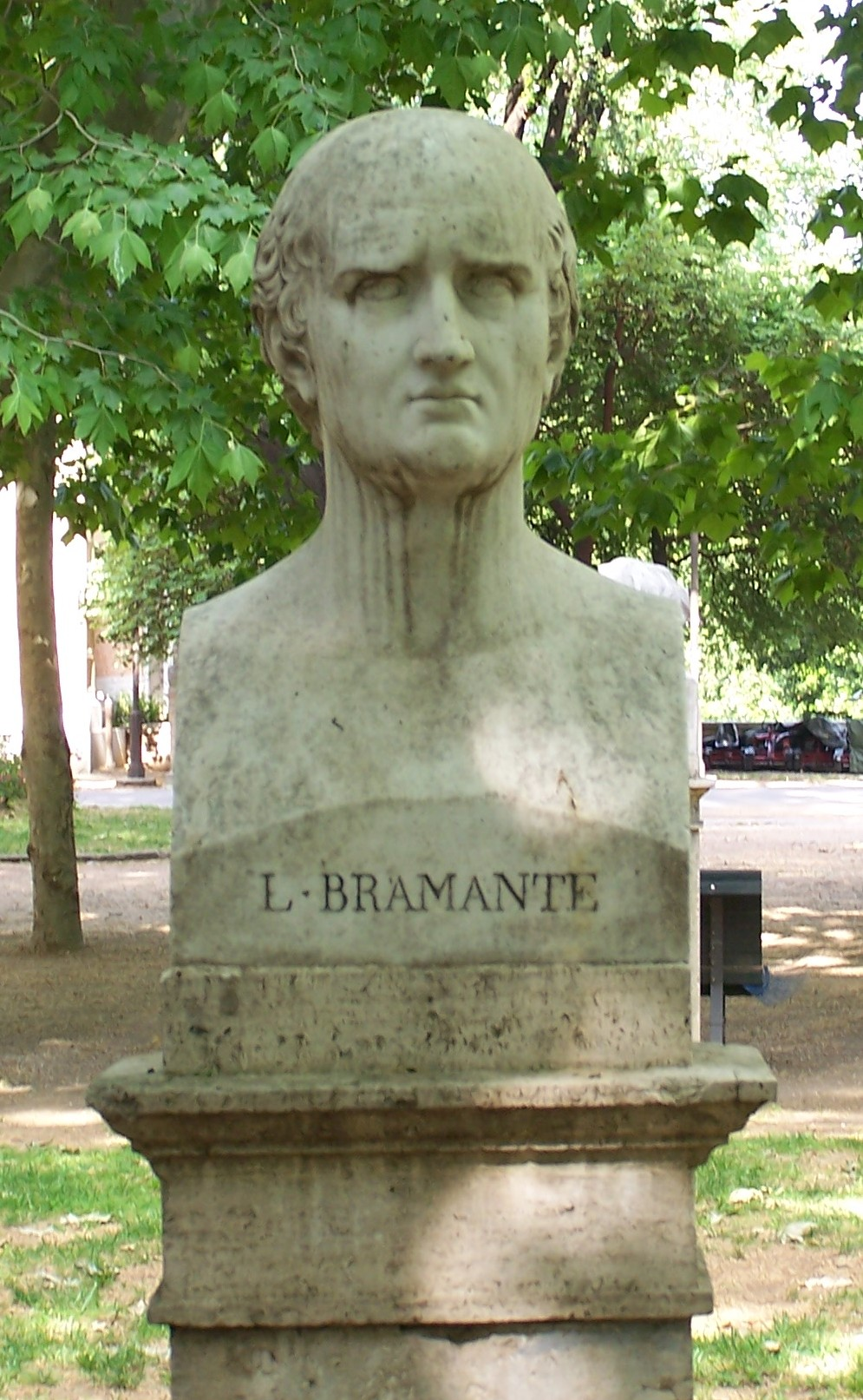 Roma Statue Bramante, Büste von Bramante in Rom im Park bei der Villa Medici